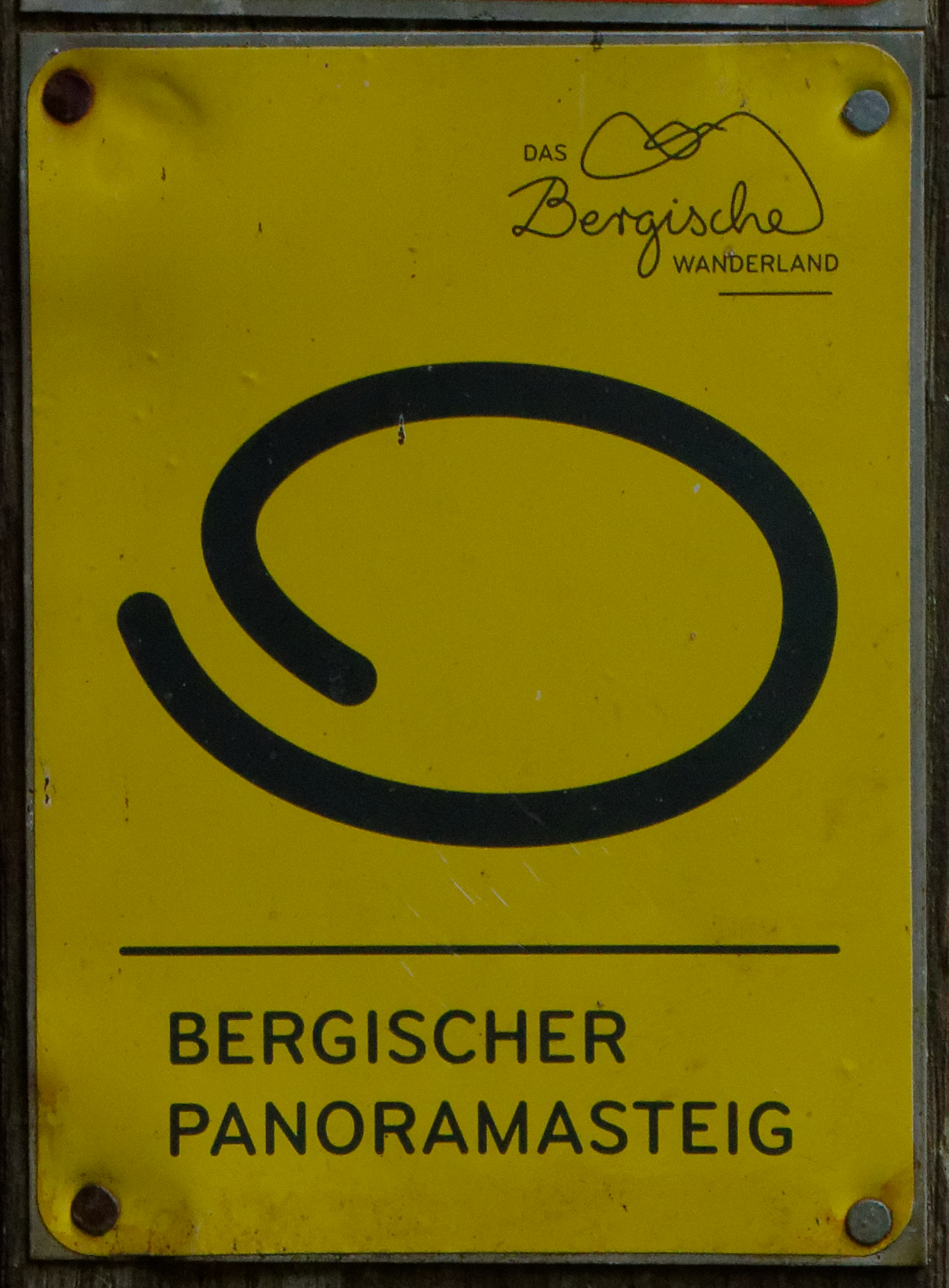 Bergischer Panoramasteig